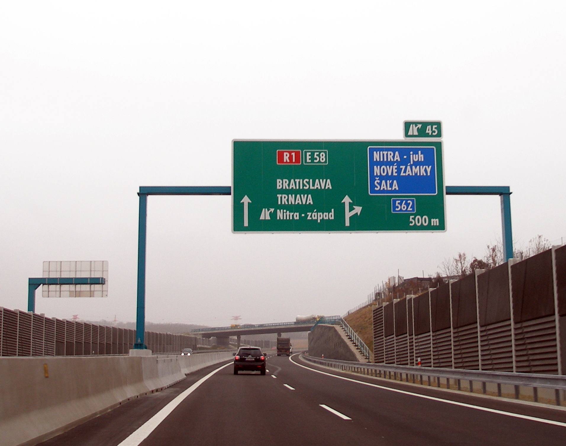 Rýchlostná komunikácia R1 PRIBINA. Úsek Nitra-Trnava.